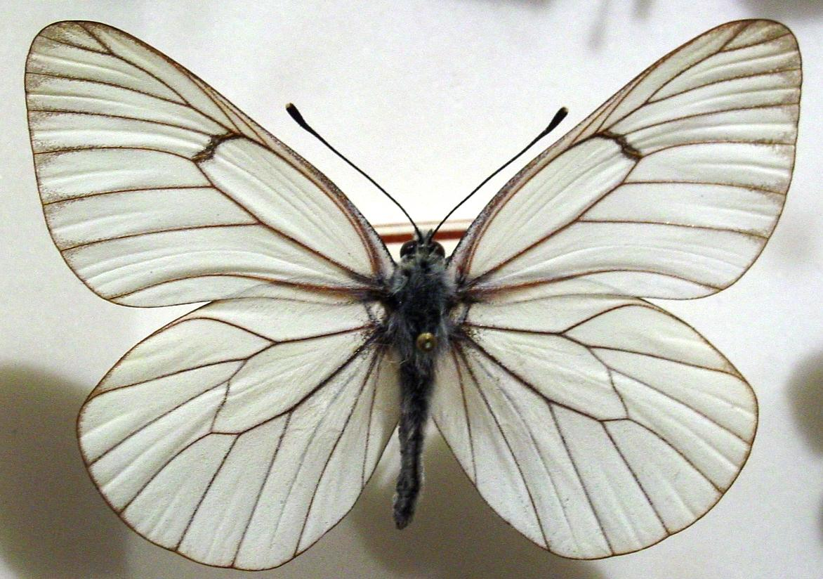 self made. Butterfly